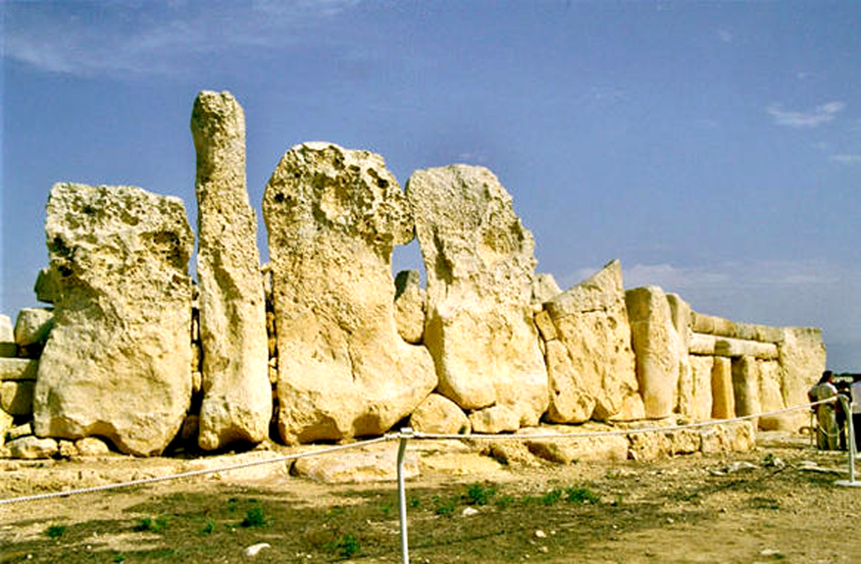 Hagar Qim Temples, Malta